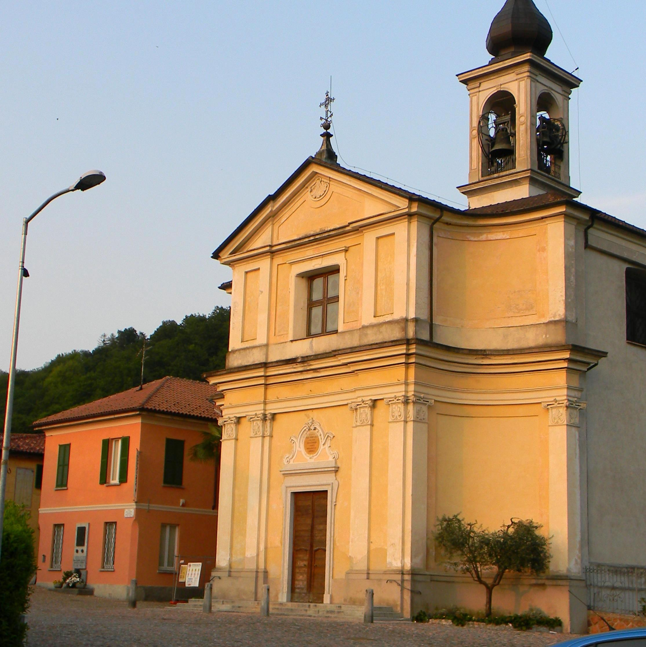 Chiesa parrocchiale dei Santi Pietro e Paolo in Brinzio